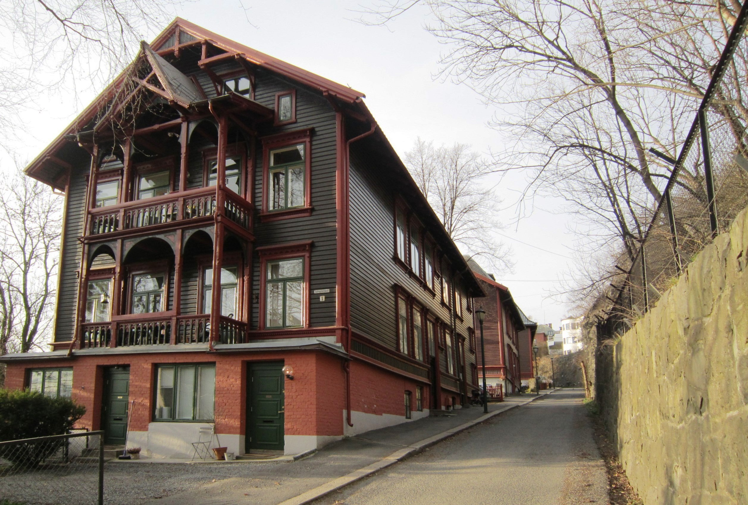 Tostrup terrasse på Skarpsno i Oslo